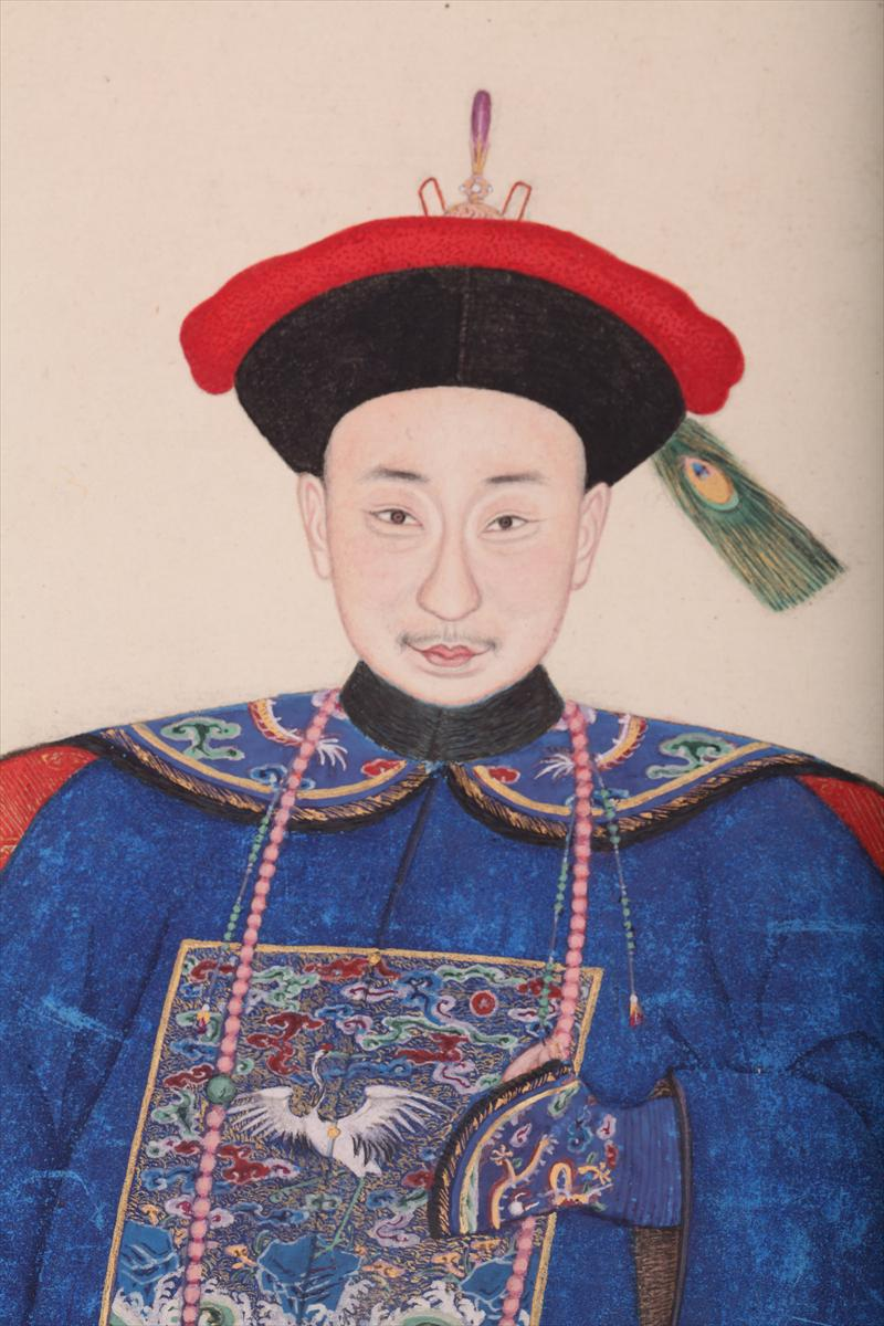 《御筆平定臺灣二十功臣像贊》中的福長安畫像，2014年由紐約iGavel拍賣行拍賣。